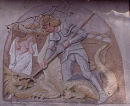 Relief hl. Georg als Drachentöter am Bildstock Sollner Säule in München.